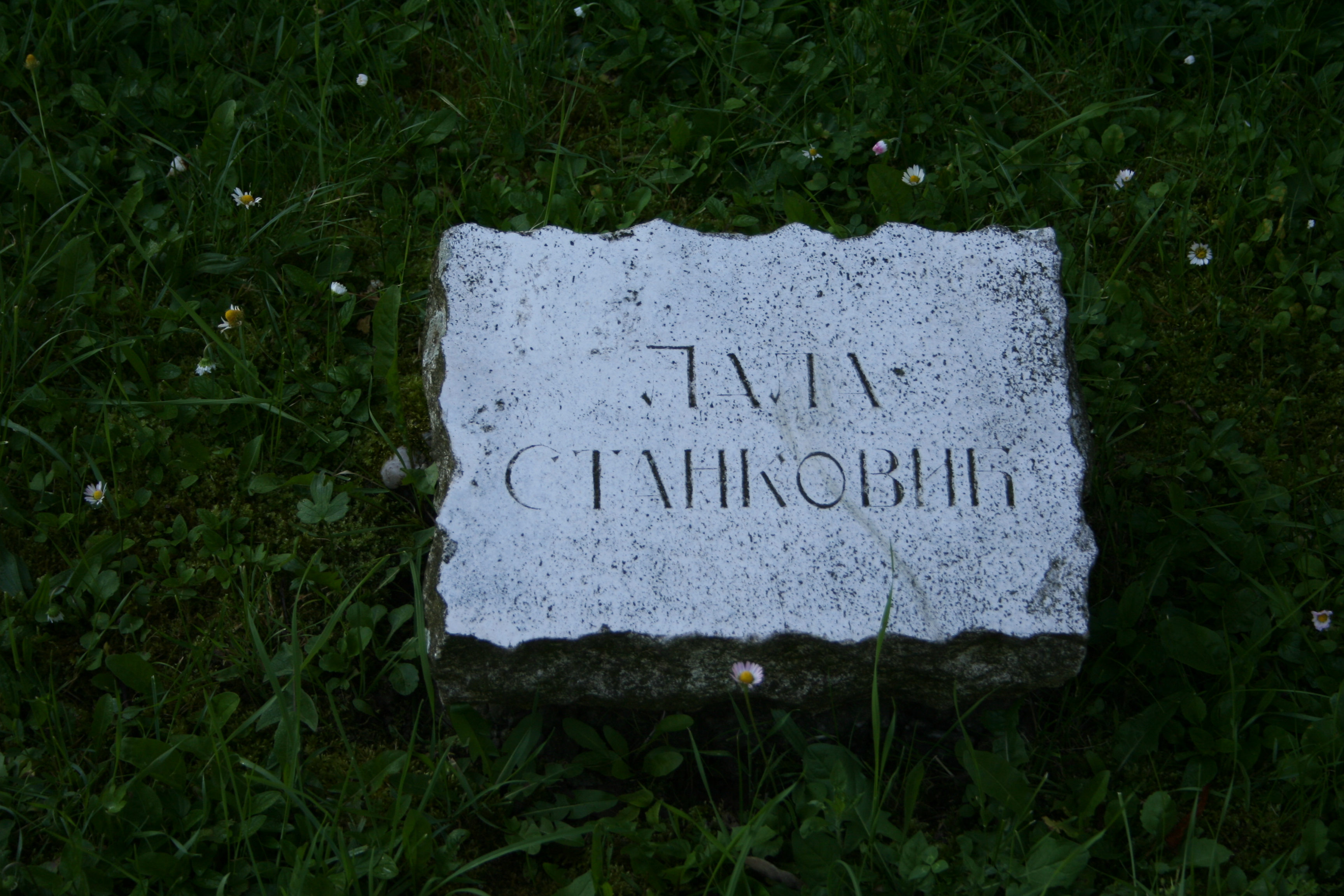 Šabac, Partizansko groblje na Donjošorskom groblju